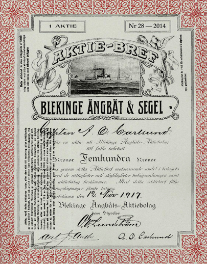 Blekinge Ångbåt & Segel 2014